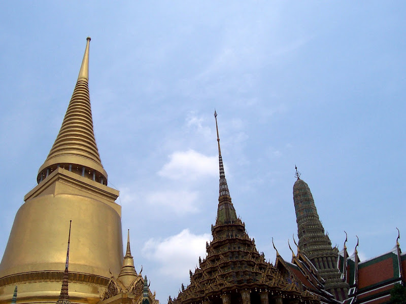 Bangkok Wat Phra Kaew Tapinagi.